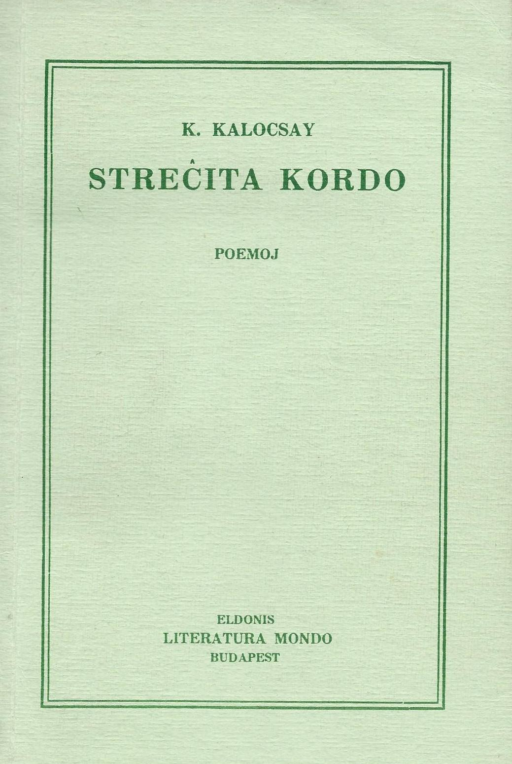 librokovrilo de libro "Streĉita_Kordo", 1978